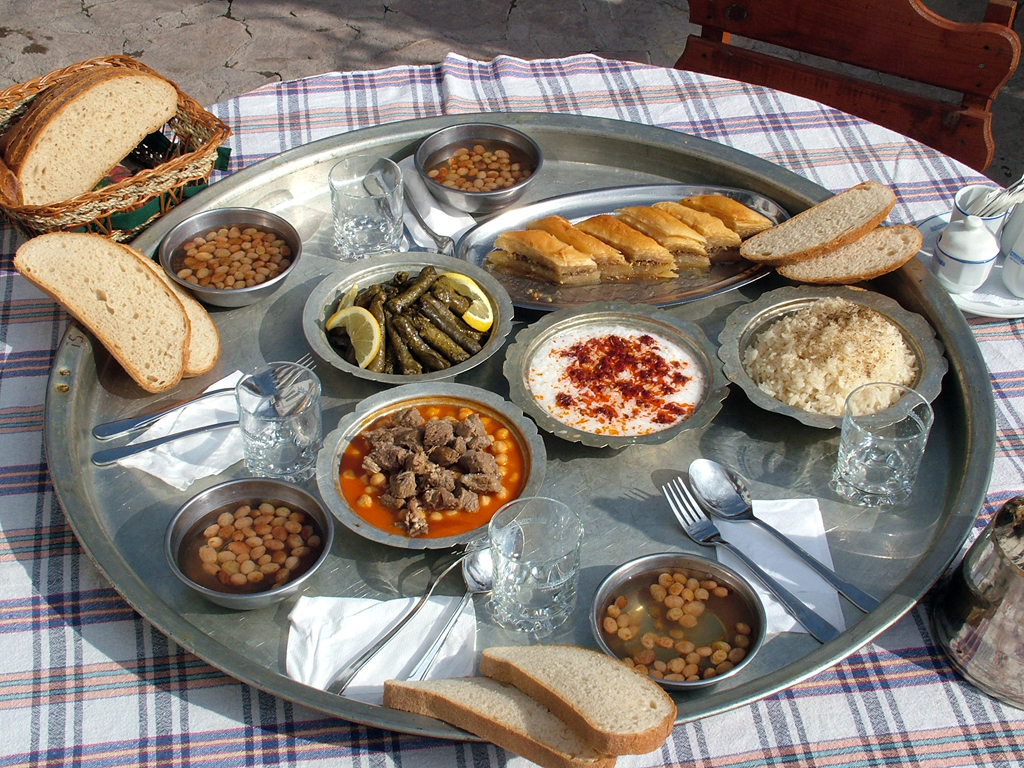 Beypazarı'nın Yöresel Lezzetleri